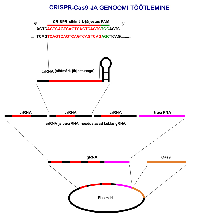 CRISPR system